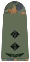 German Army rank insignia Oberleutnant